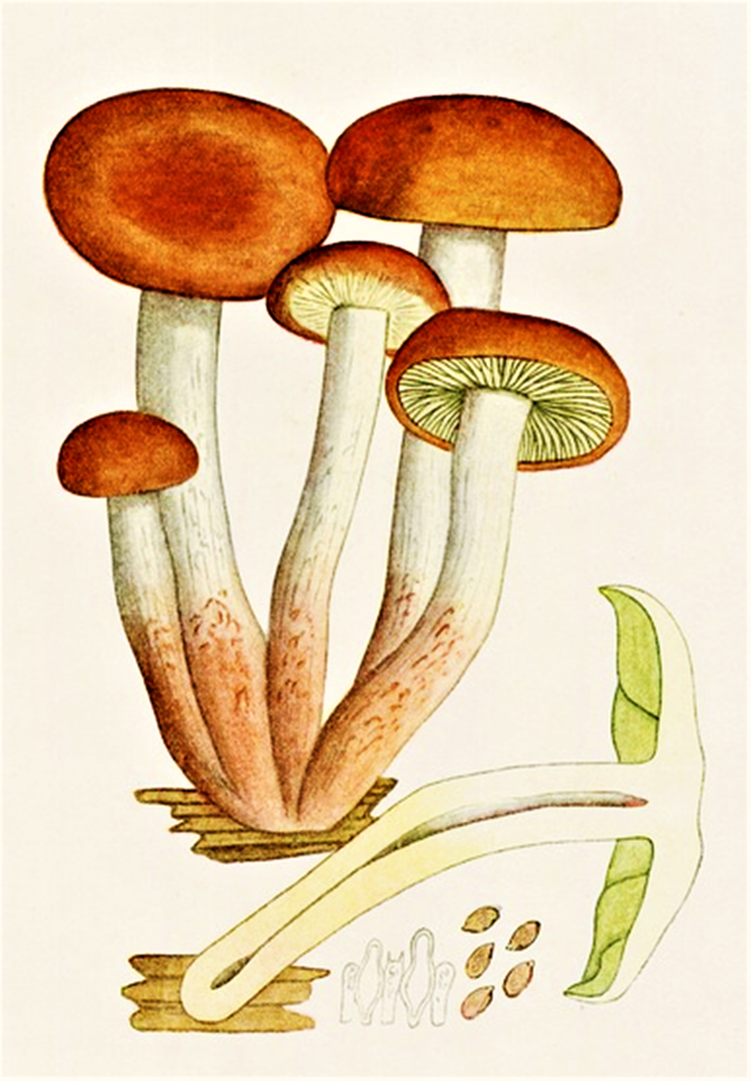 Giacomo Bresadola: Hypholoma sublateritium (Fr., 1838) Quél. (1872), heute Hypholoma lateritium (Schaeff., 1774) P.Kumm. (1871)